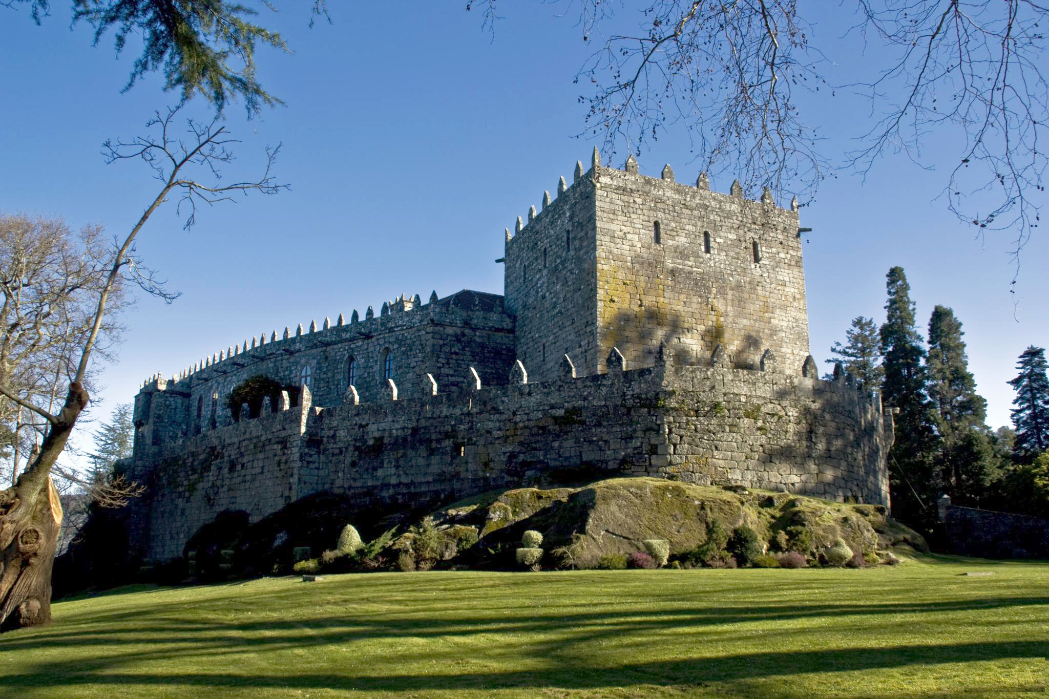 O castelo de Soutomaior atópase na parroquia de San Salvador de Soutomaior, no concello de Soutomaior pertencente á comarca de Vigo, provincia de Pontevedra.